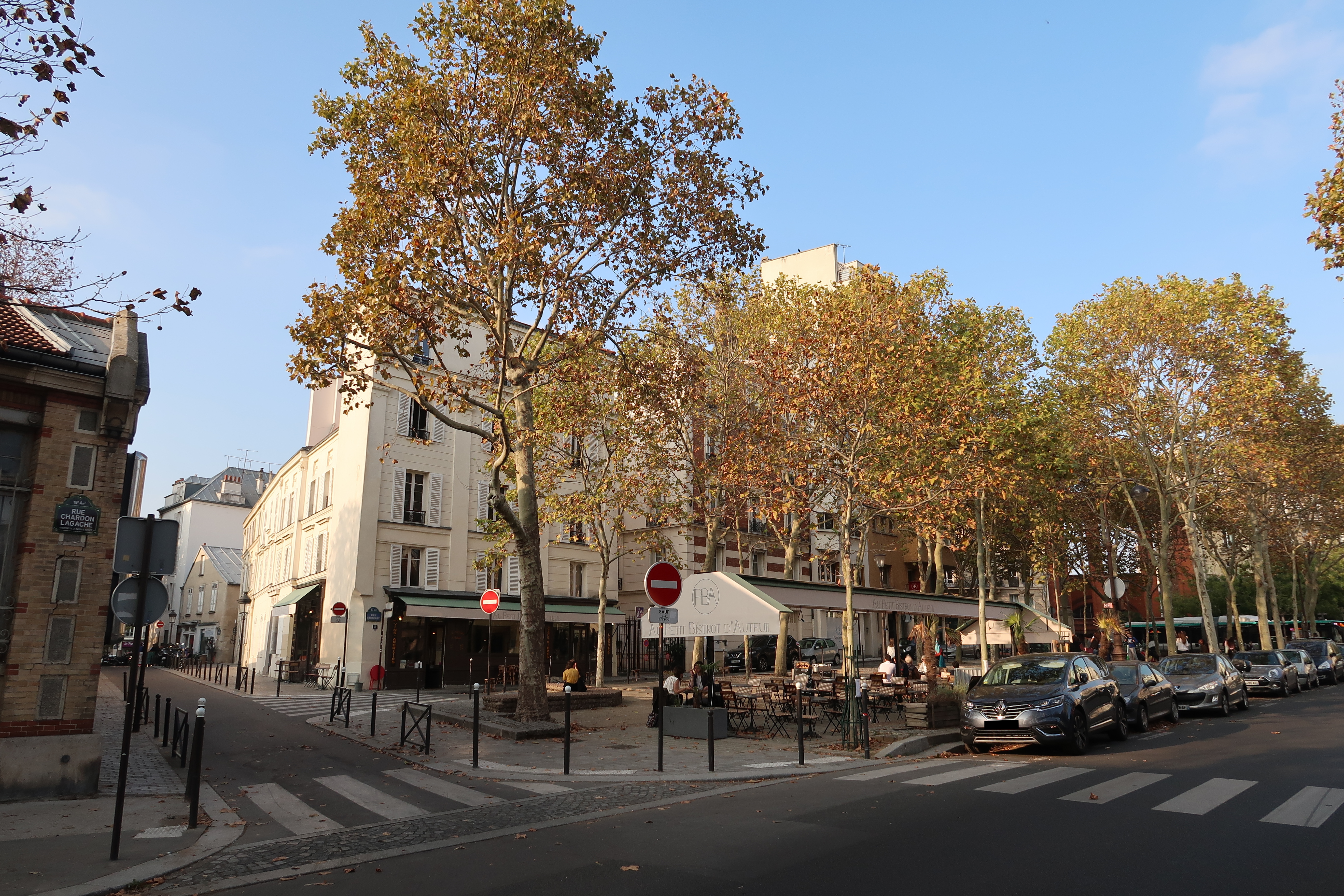 Place de l'Église-d'Auteuil (Paris, 16e).